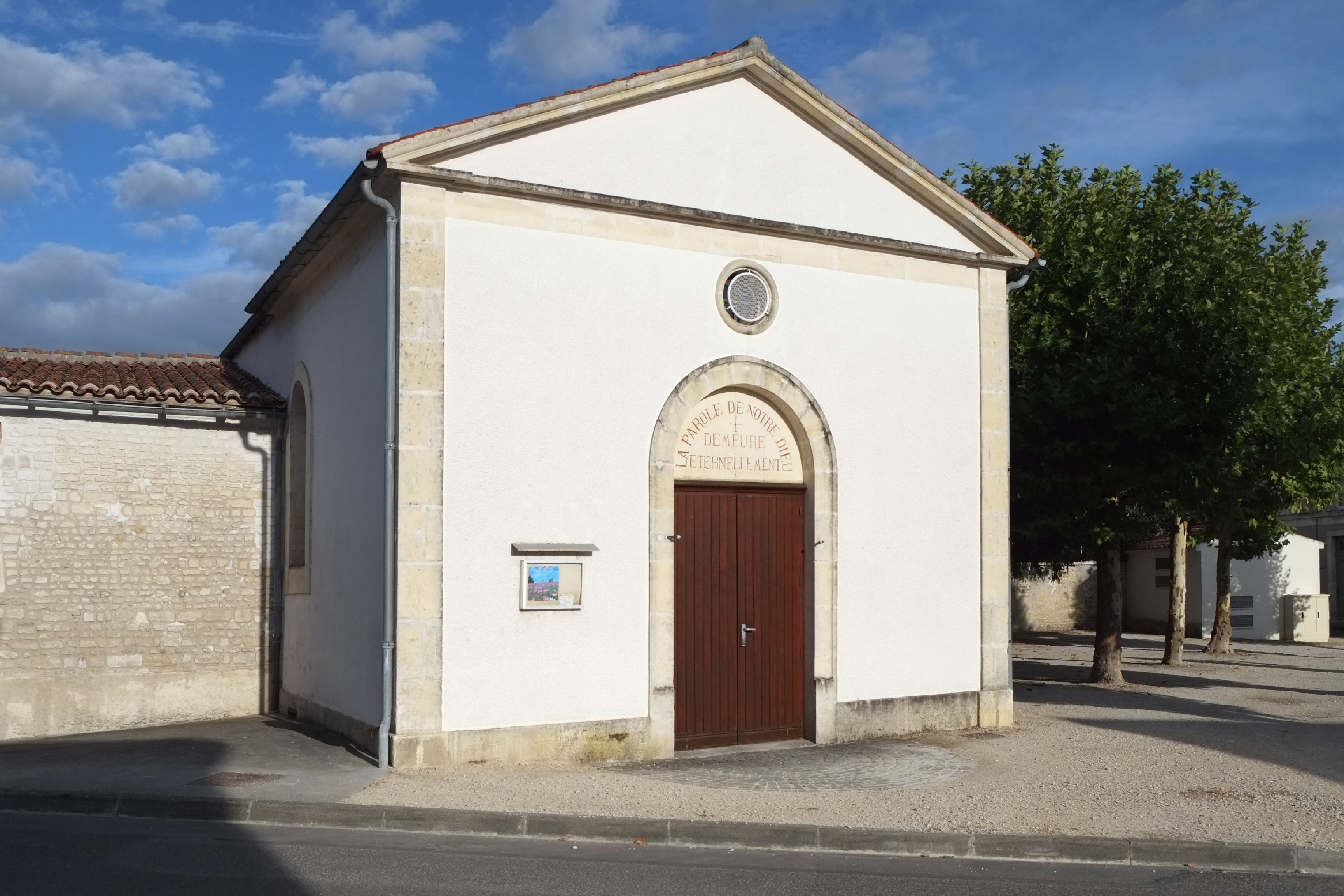 Temple protestant Matha Charente-Maritime France